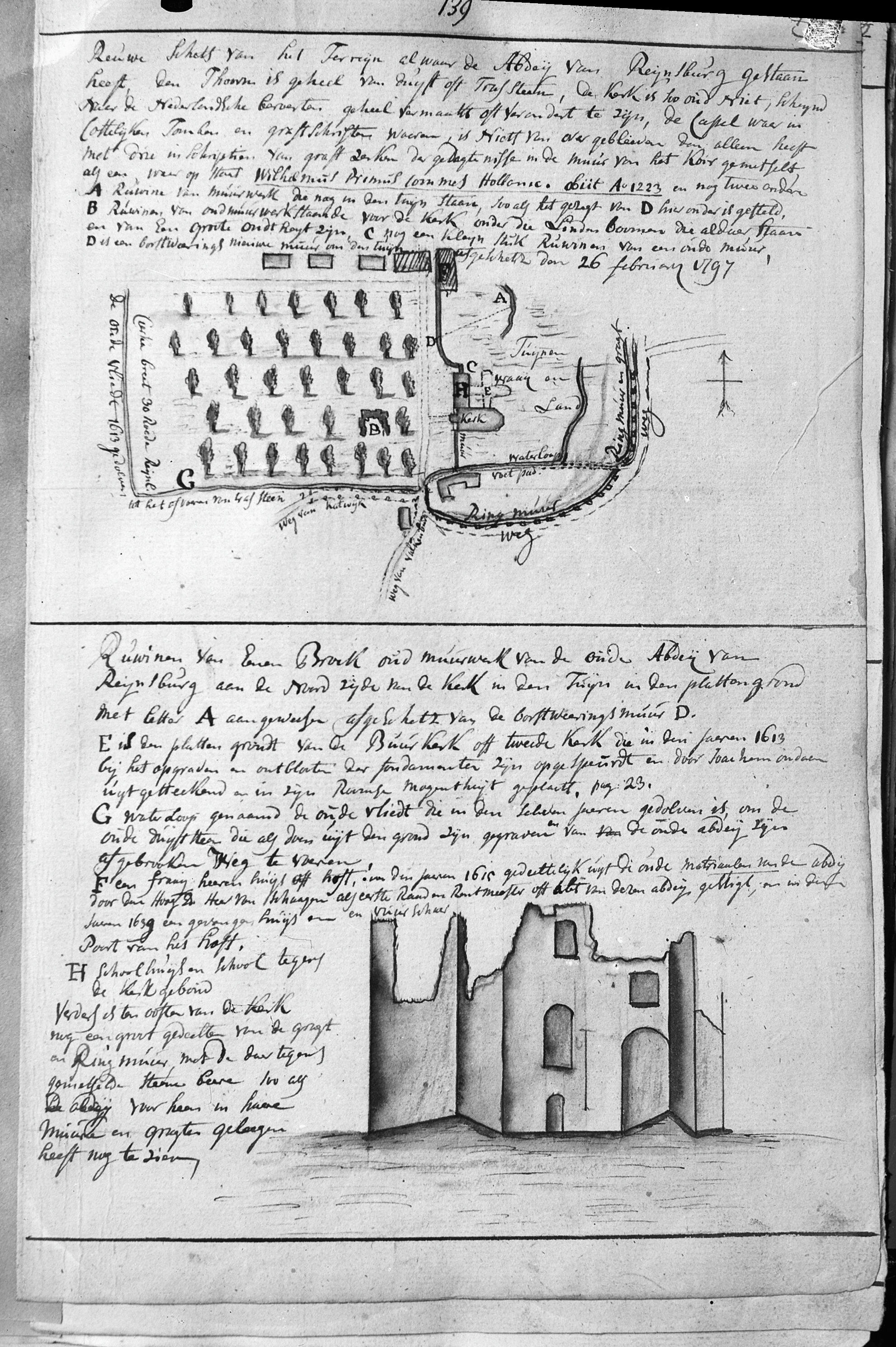 situatieplan en ruïne van de abdij, Hs.Verhees